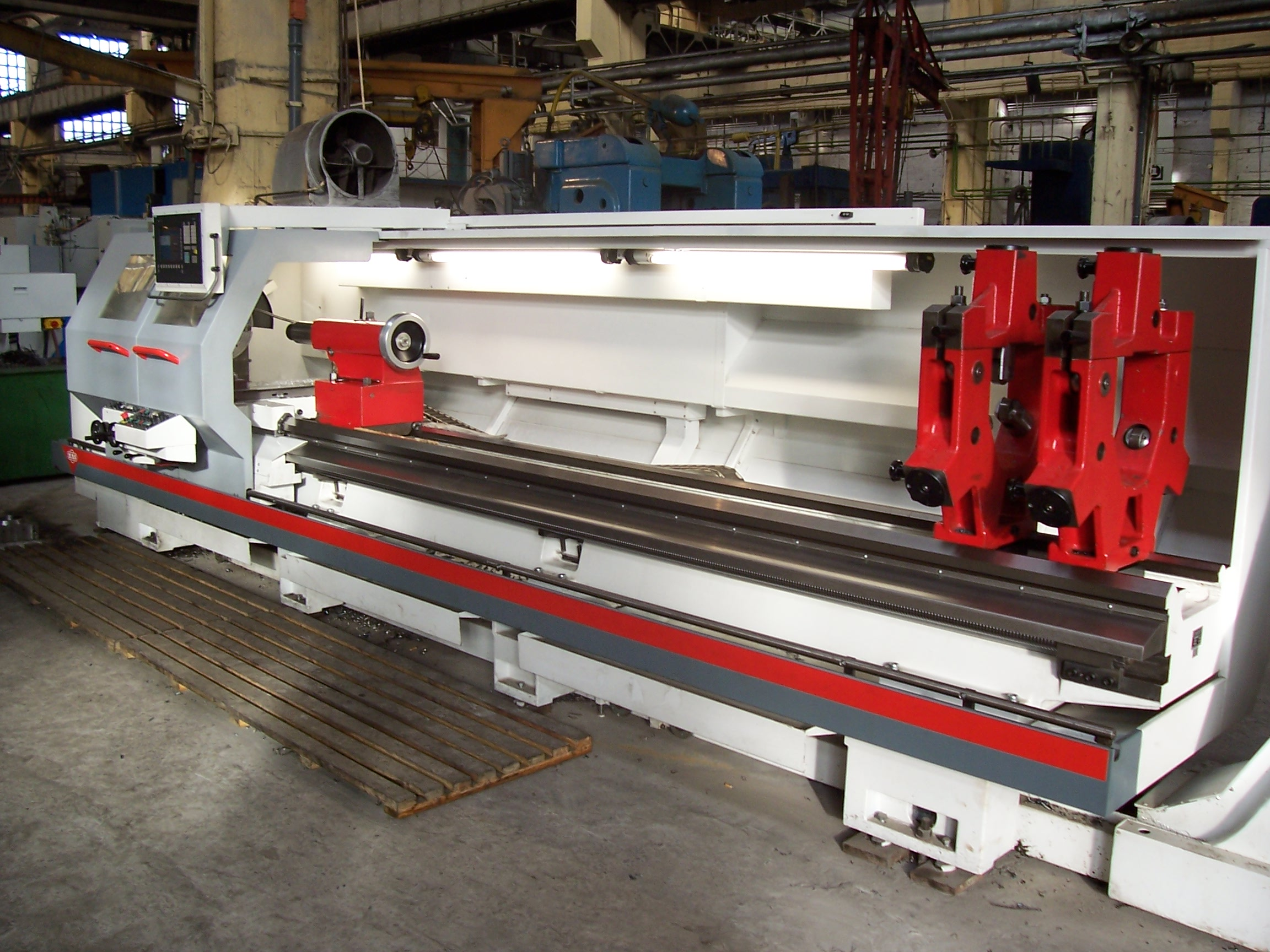 Токарно-гвинторізний_верстат_з_ЧПУ_Masturn: Токарно-гвинторізний_верстат_з_ЧПУ_Masturn